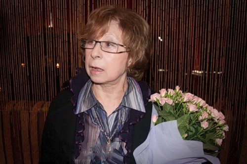 На премьере "Generation П"